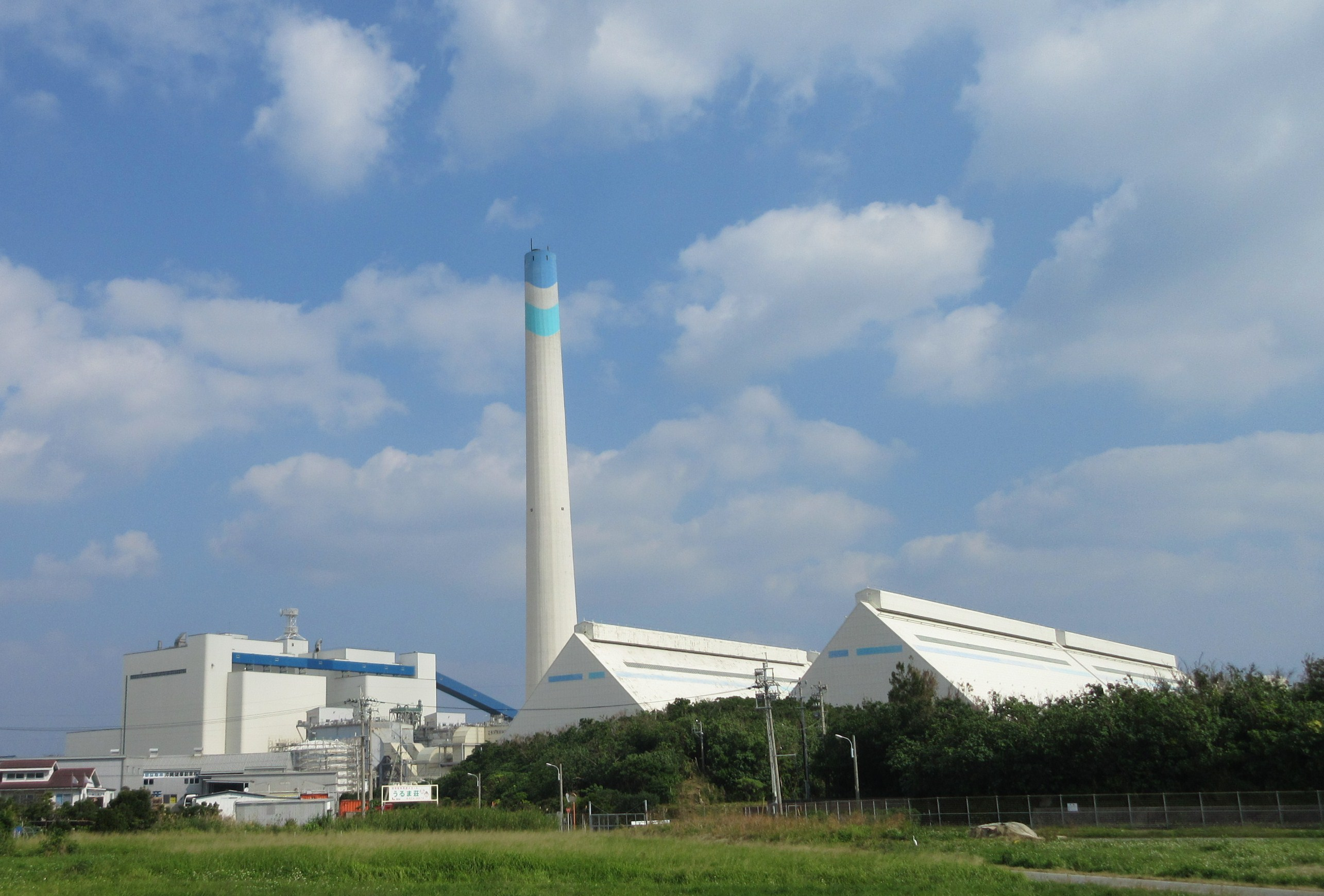 沖縄電力株式会社具志川火力発電所